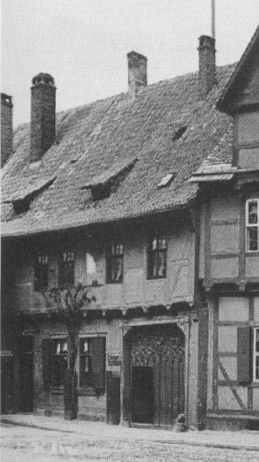 Abteivorwerk, Schloßberg 11, Quedlinburg um 1900, Ausschnitt aus Fotografie